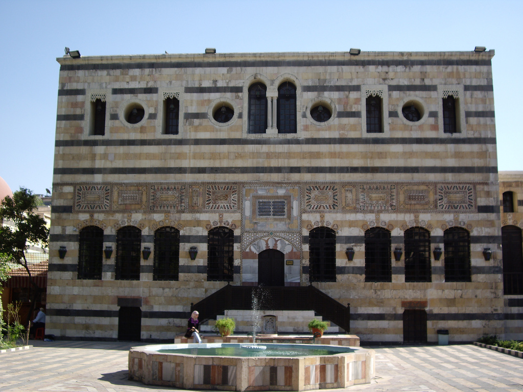 Azem Palace — Ottoman era architecture in Damascus (Syria).